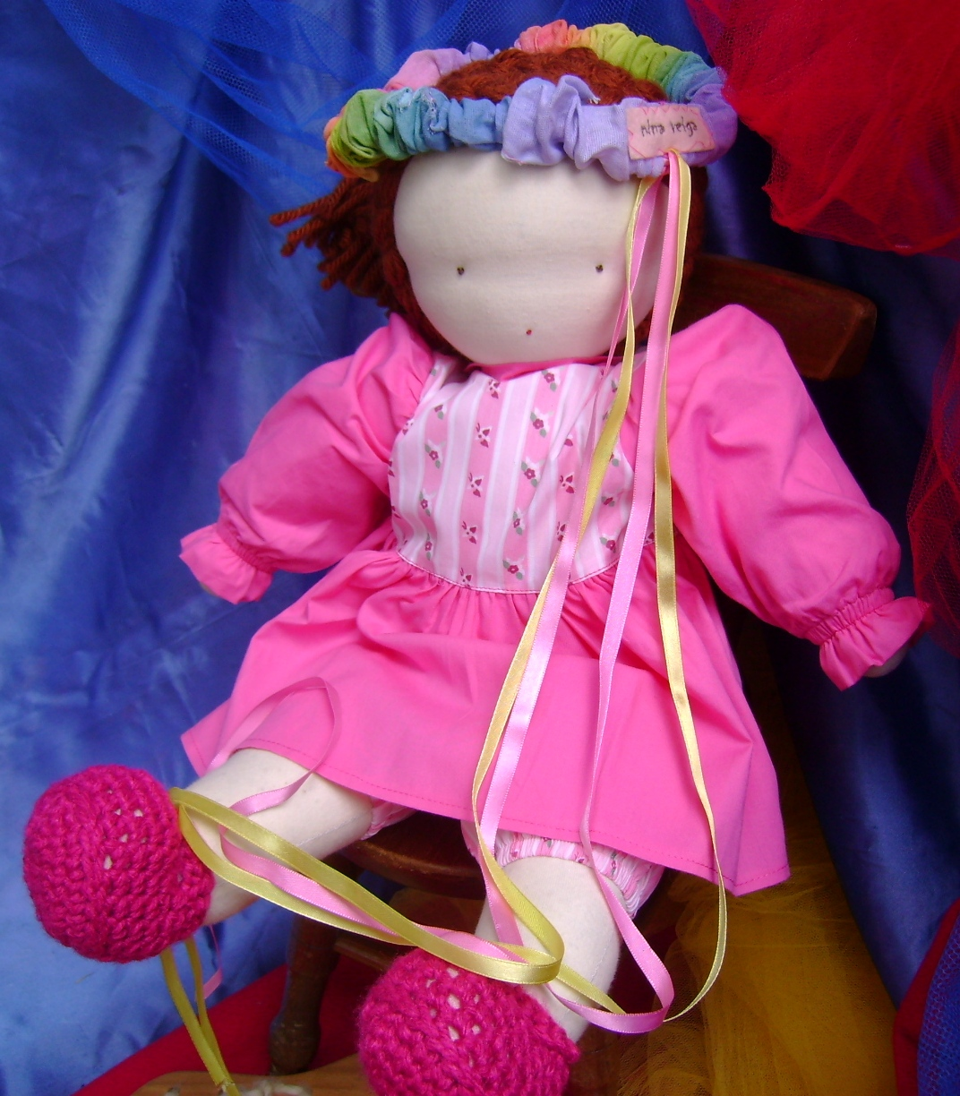 Waldorf dolls by Nina Veiga